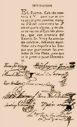 Invitación al cabildo abierto del 22 de mayo de 1810 en Buenos Aires, en donde se discutió el destino del virrey Cisneros